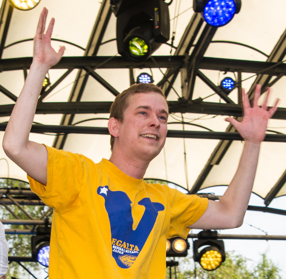 Sportjournalisten Erik Niva inför att Sveriges U21-landslag blir firad i Kungsträdgården i Stockholm den 1 juli av 1000-tals fans efter guldet i U21-Europamästerskapet i fotboll 2015.